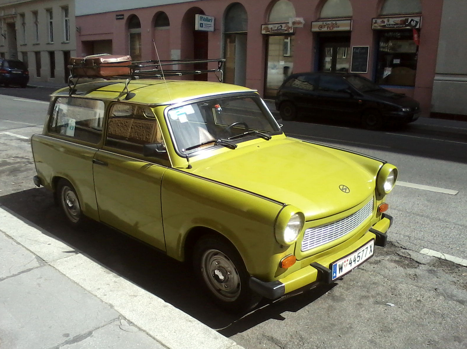 Trabant (1040, Schelleingasse 39)